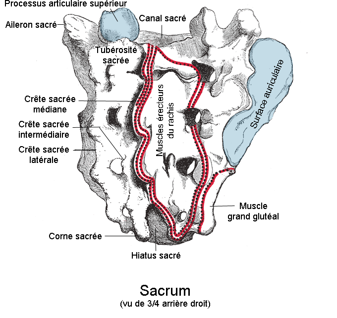 Sacrum. Vue de 3/4 postérieur. Anatomie humaine